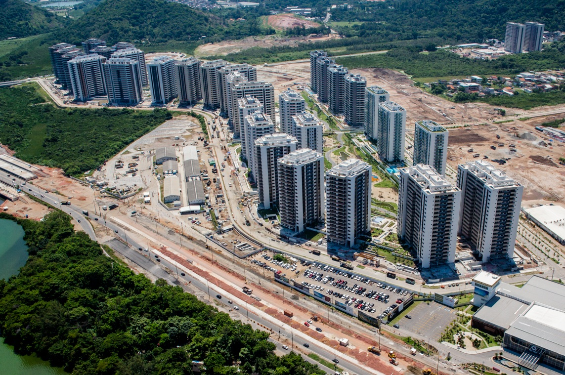 Vila dos Atletas, na Barra da Tijuca.